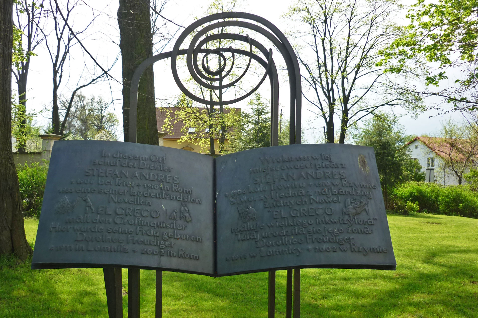 Łomnica - tablica poświęcona niemieckiemu pisarzowi Stefanowi Andersowi